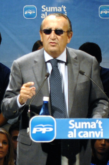 Carlos Fabra, polític valencià. A la campanya electoral de 2011